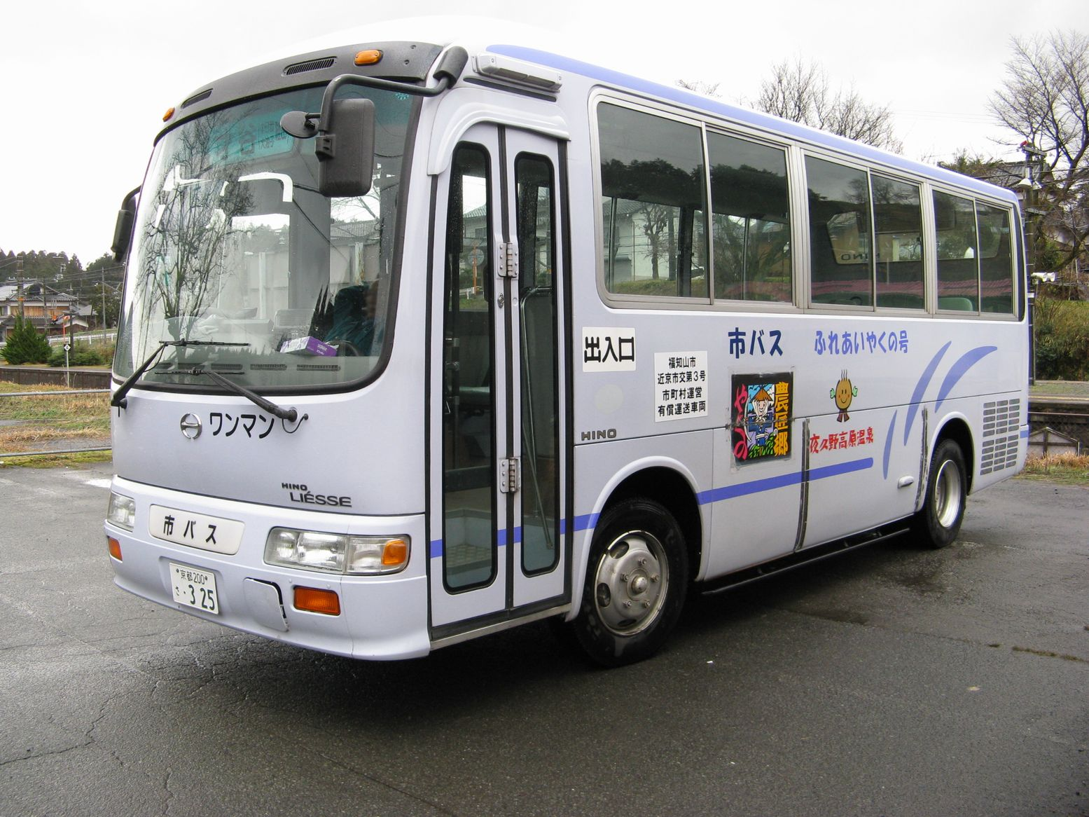 福知山市営バス 夜久野バス（ふれあいやくの号）板生千原線 上夜久野駅前にて